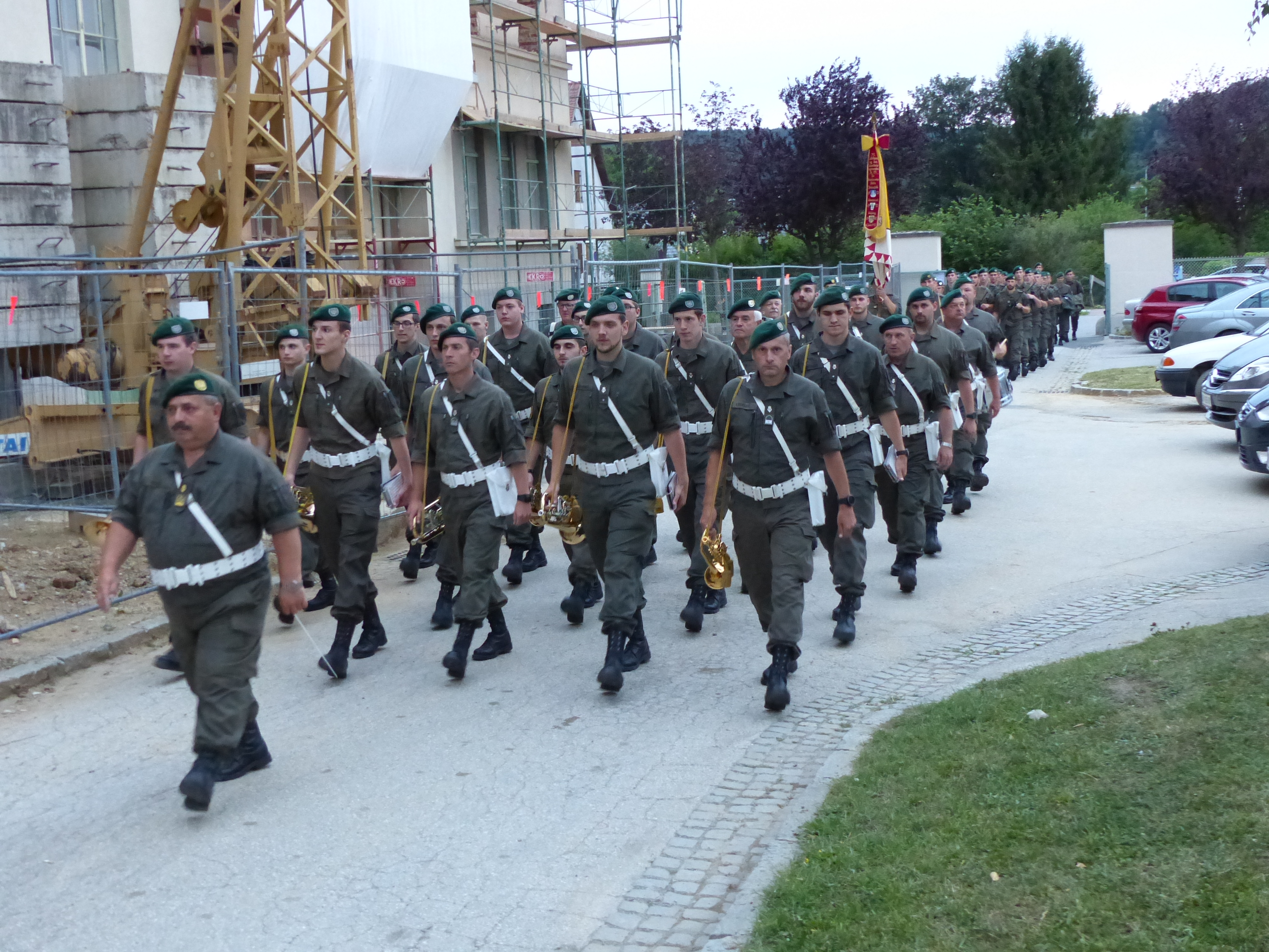 Militärmusik Burgenland in Pinkafeld anlässlich der Aufführung eines Großen Zapfenstreiches auf dem Gelände der ehemaligen Turba-Kaserne.